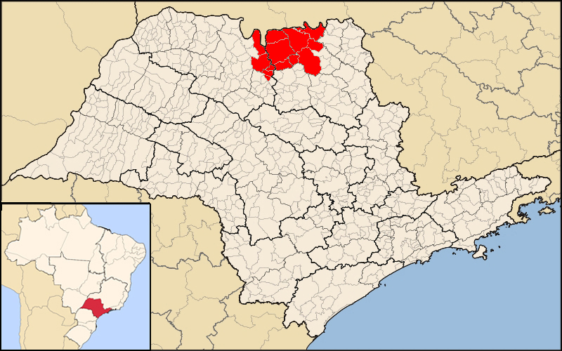 Mappa della diocesi di Barretos, nello stato di San Paolo, Brasile. Fonte per i confini della diocesi